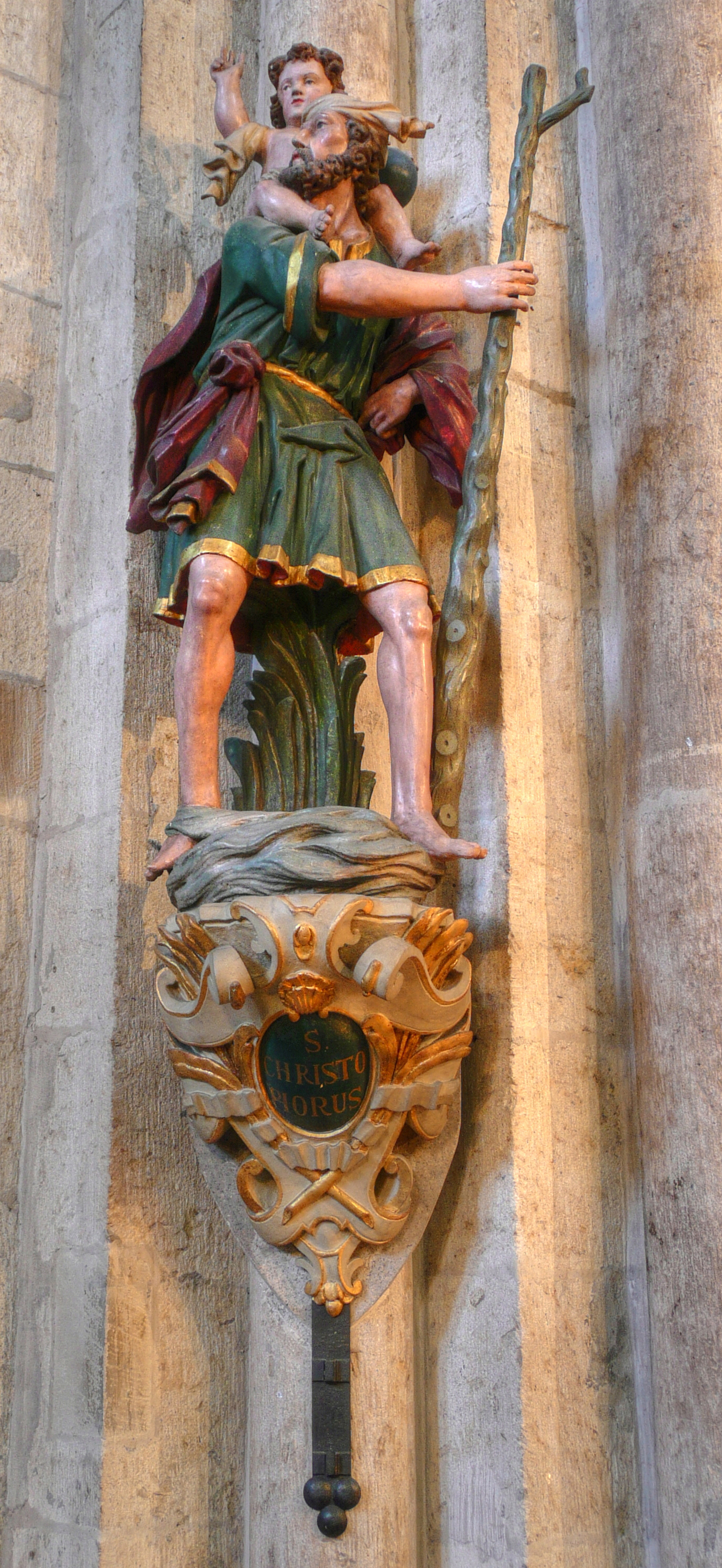 Skulptur des Hl. Christophours in der Kölner Kirche St. Aposteln)